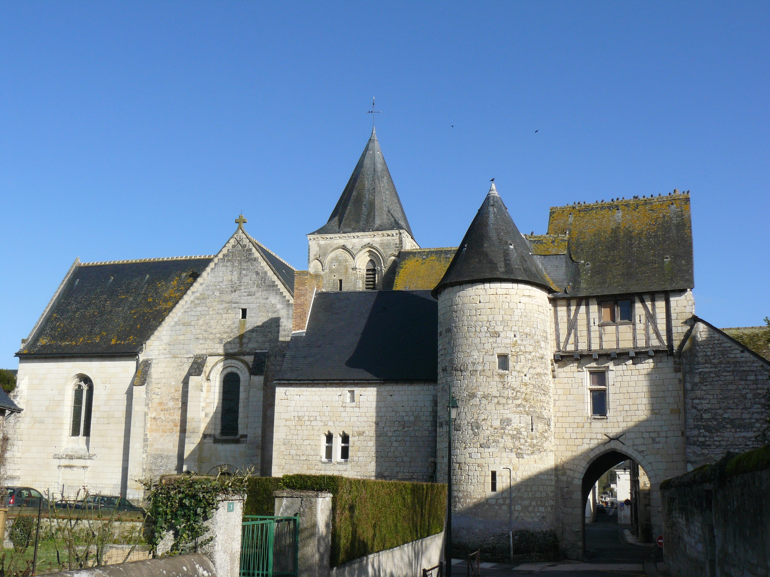 Eglise de Saint-Epain